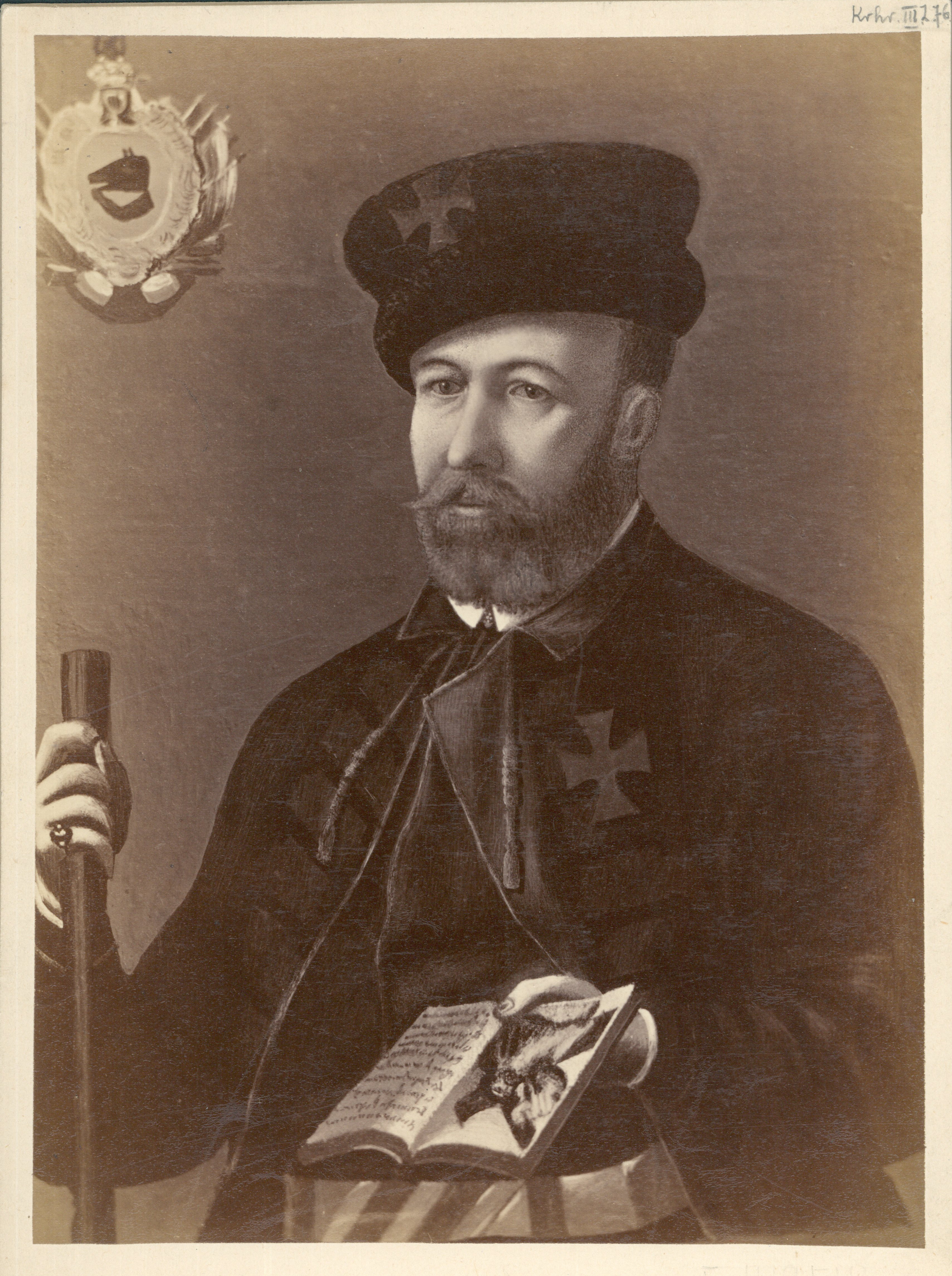 Szymon Zieliński, XIX-wieczny imprint obrazu olejnego nieznanego autorstwa z XVIII w.